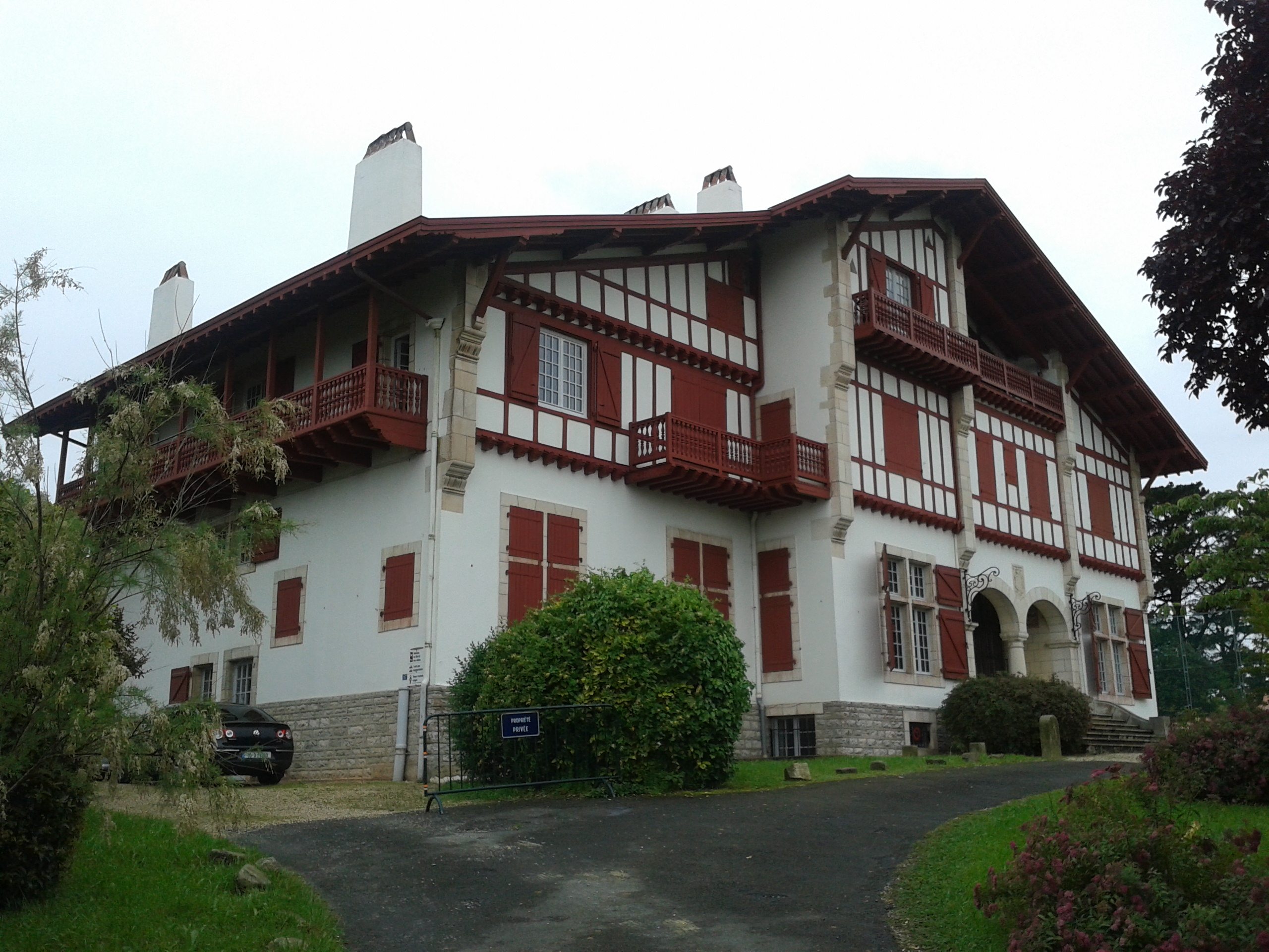 Lapurdiko Getariako Saraleginea etxea